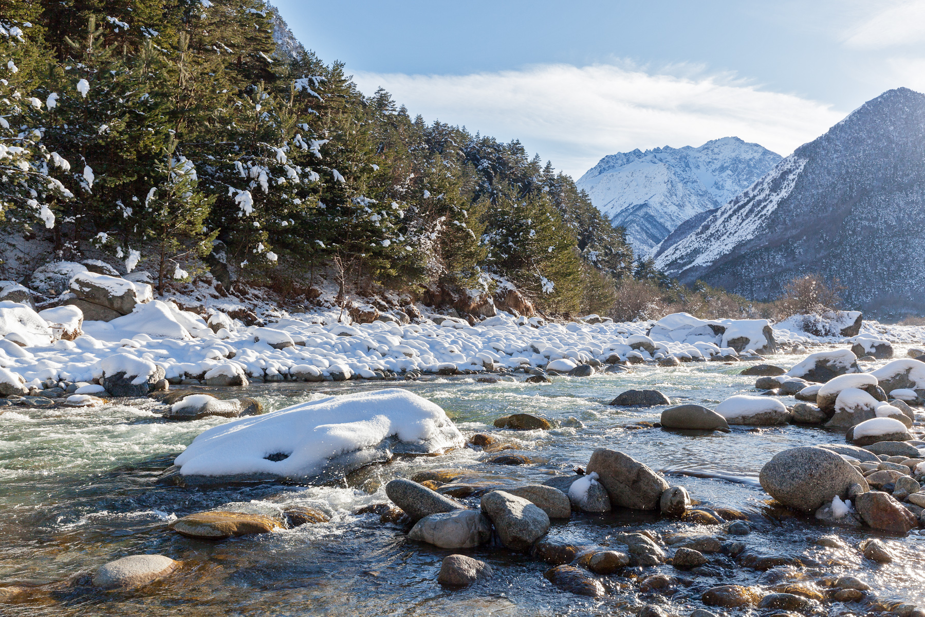 Национальный парк Алания: Ирафский район, Северная Осетия This image is related to the protected area of Russia number 1500198